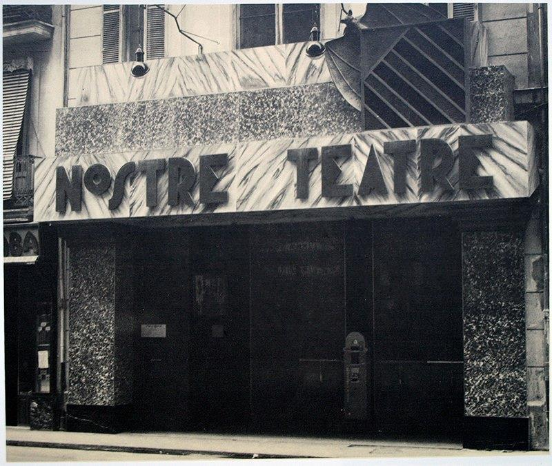 Façana del "Nostre Teatre" de València, anys 30.